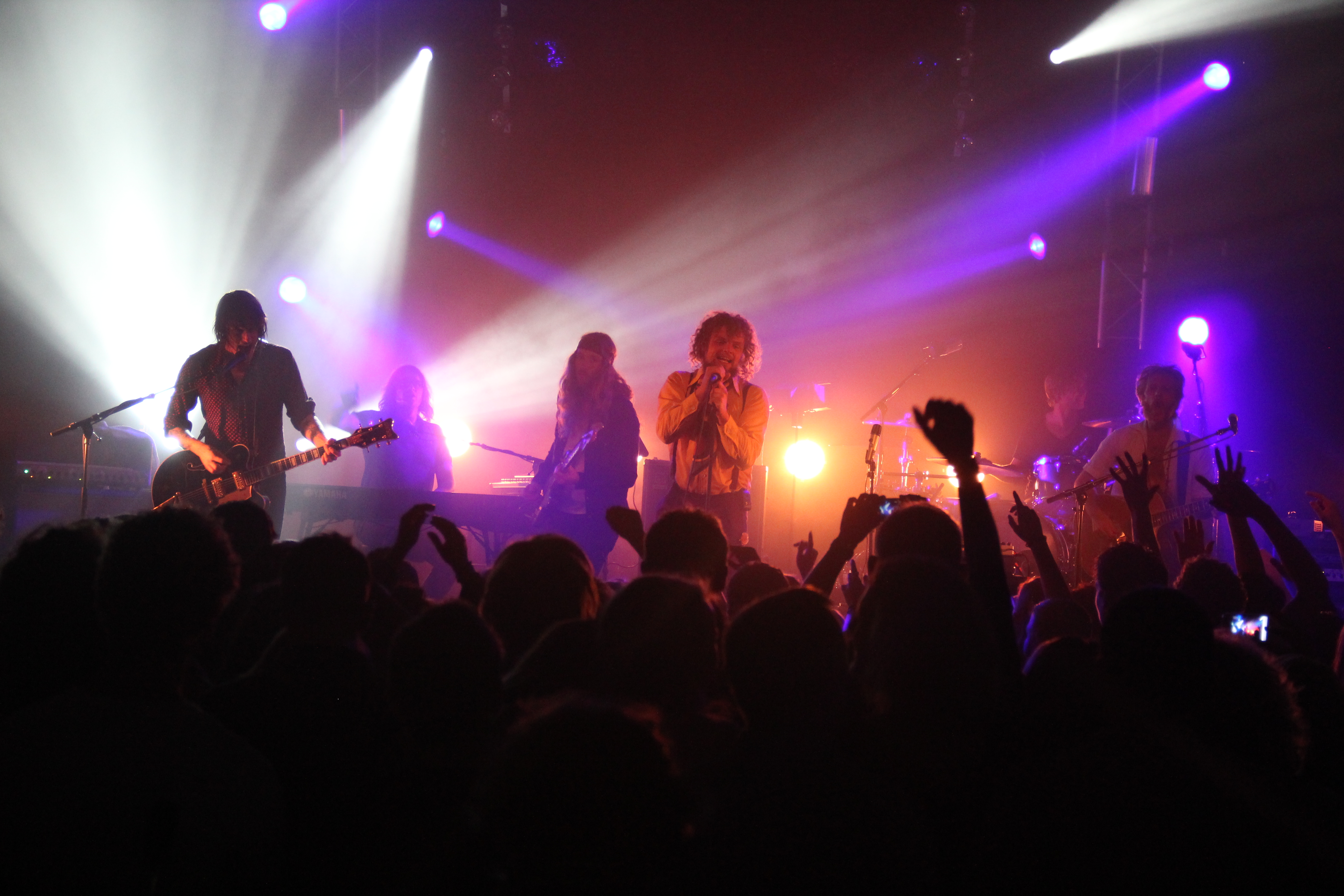 Di-rect tijdens een optreden bij Poppodium Apollo 2012